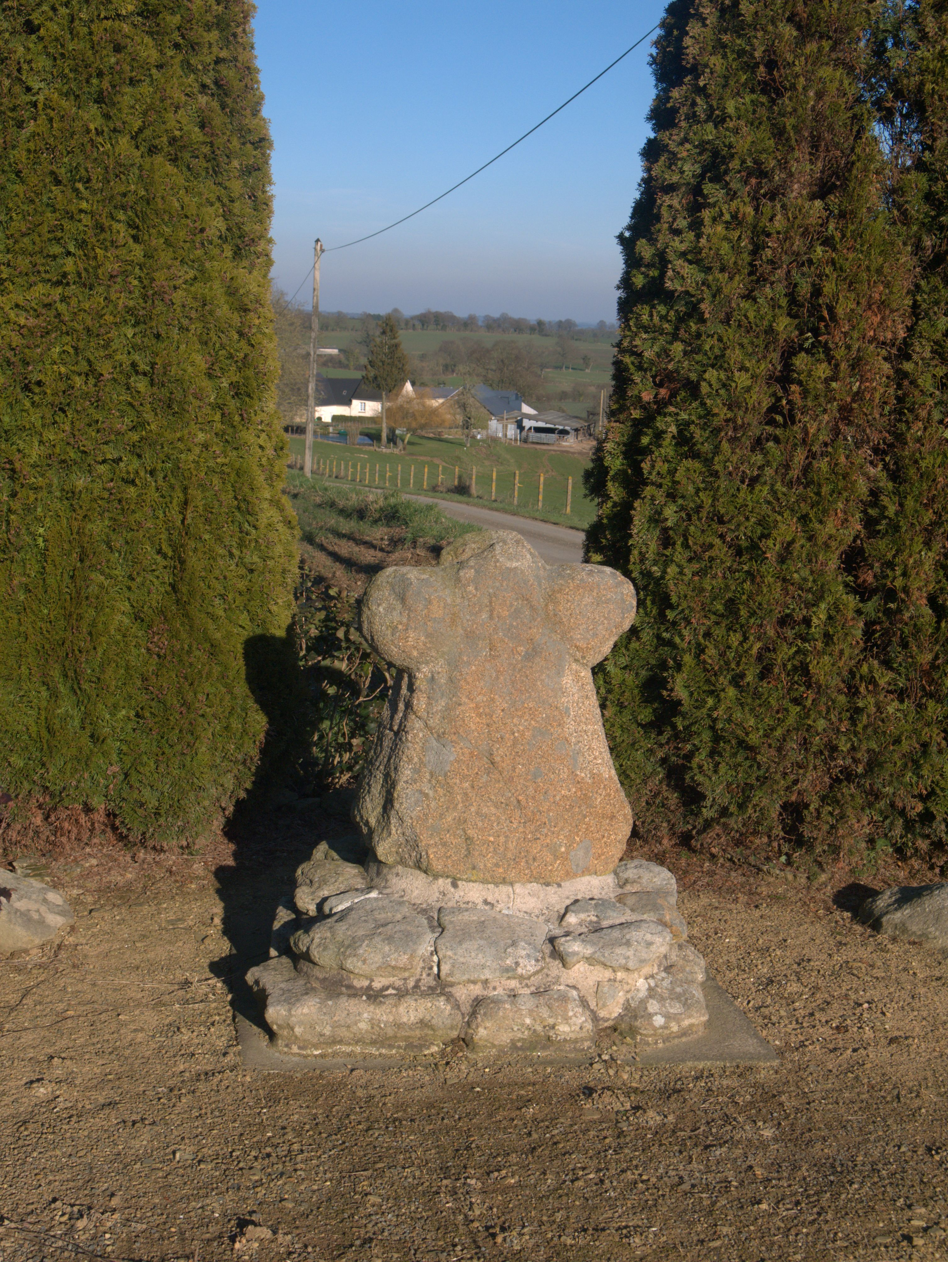 Croix du Vème siècle